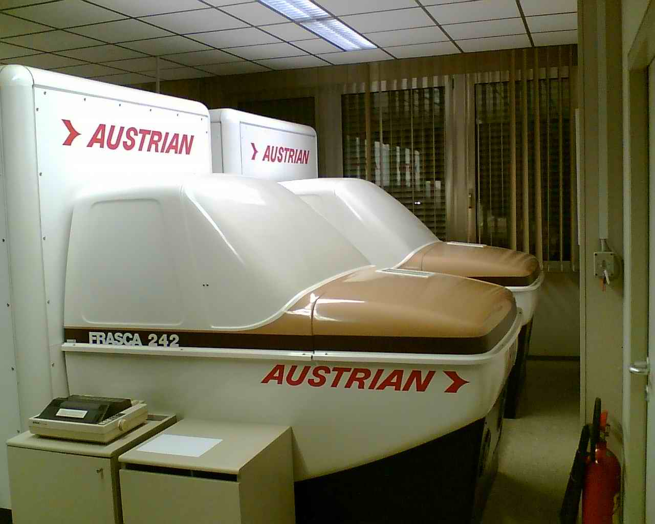 Frasca-242 / Cessna 310R FNPT-I Verfahrenstrainer